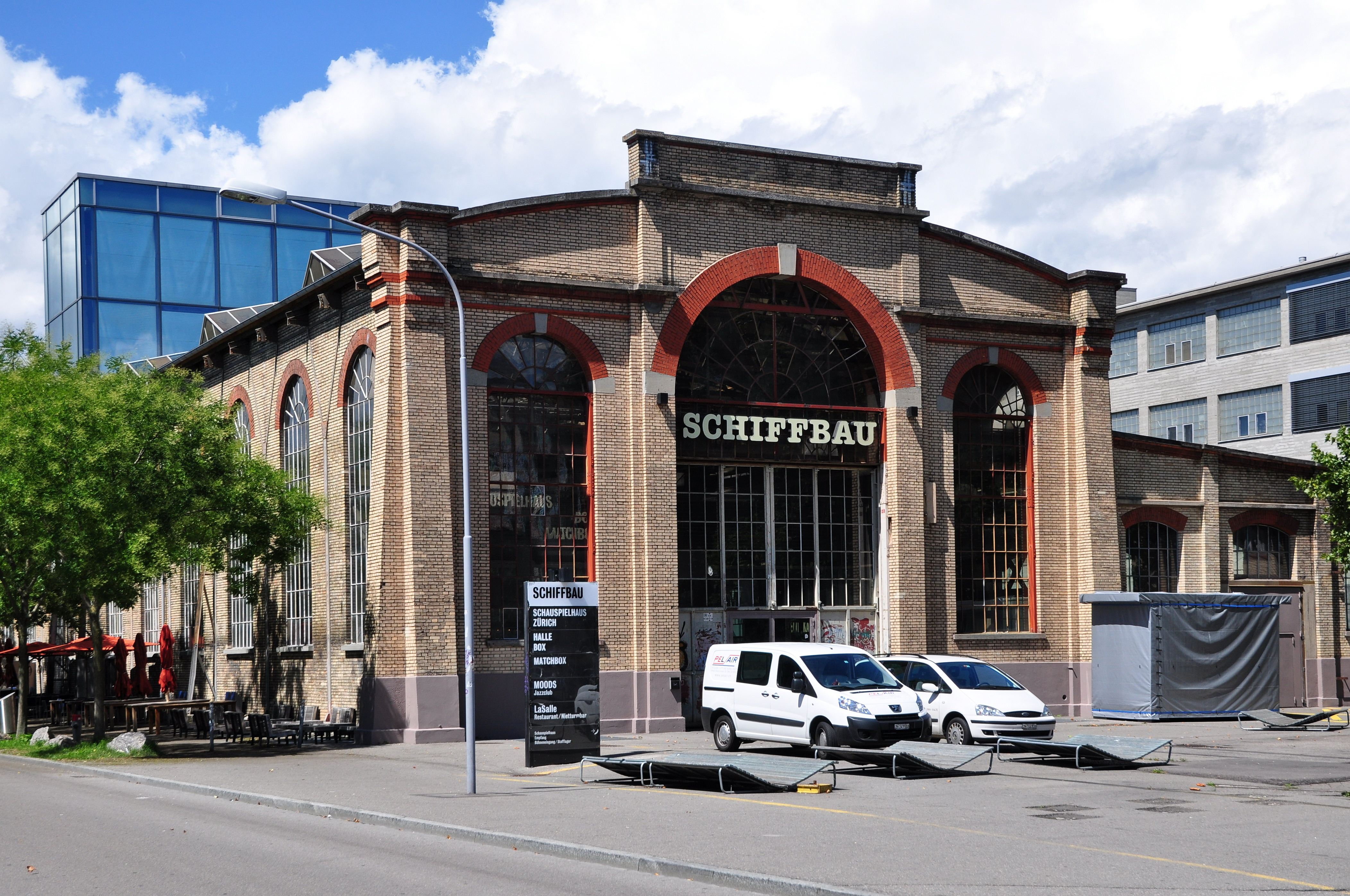 Schiffbau, Ehemalige Fabrikanlage Escher-Wyss in Zürich-Industriequartier (Switzerland)